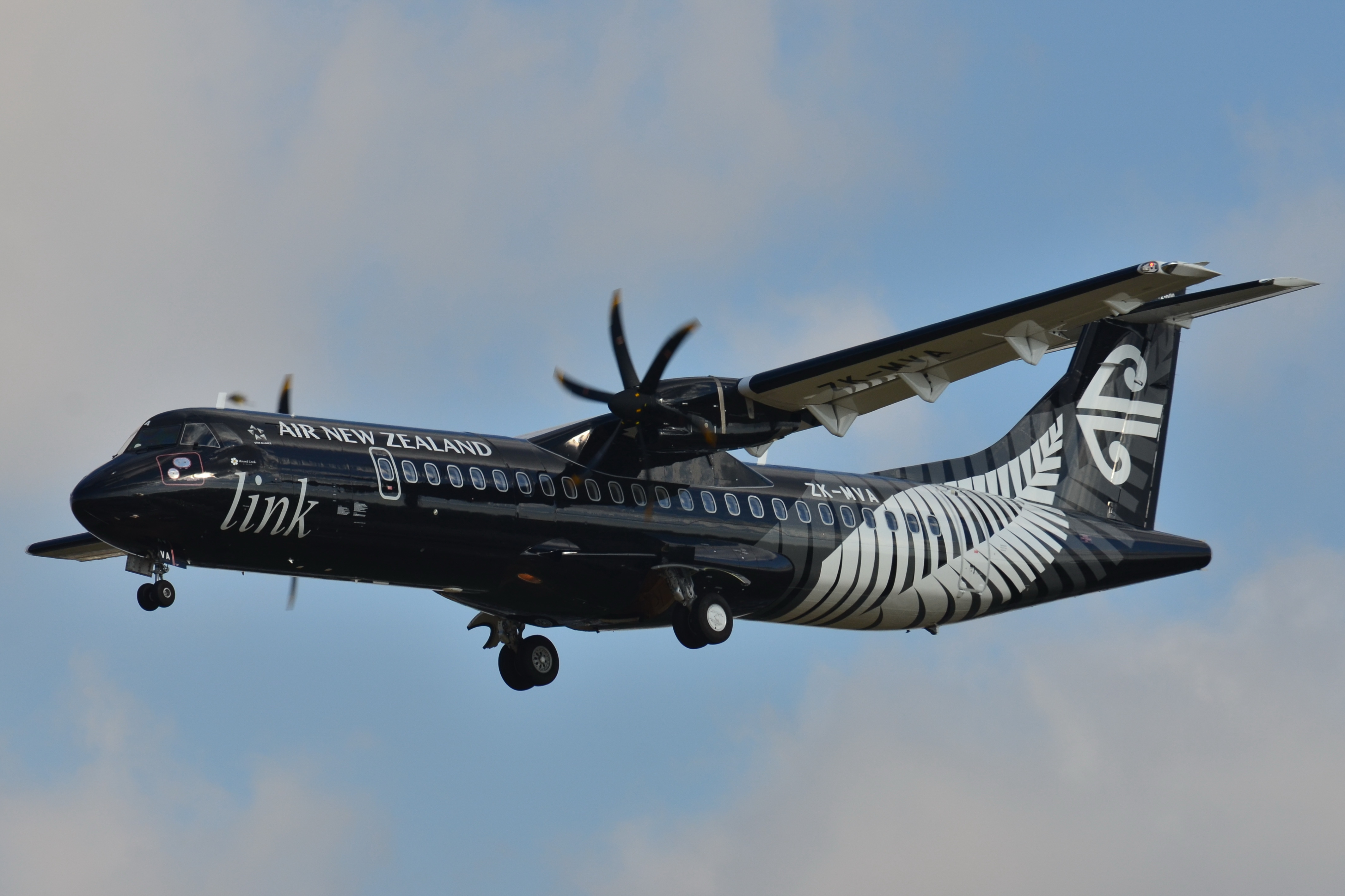 Photo prise à l'aéroport de Toulouse-Blagnac (LFBO) en France. Picture take at Toulouse-Blagnac Airport (LFBO) in France.